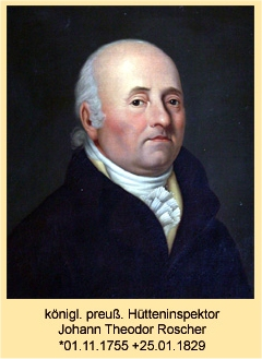 Johann Thodor Roscher